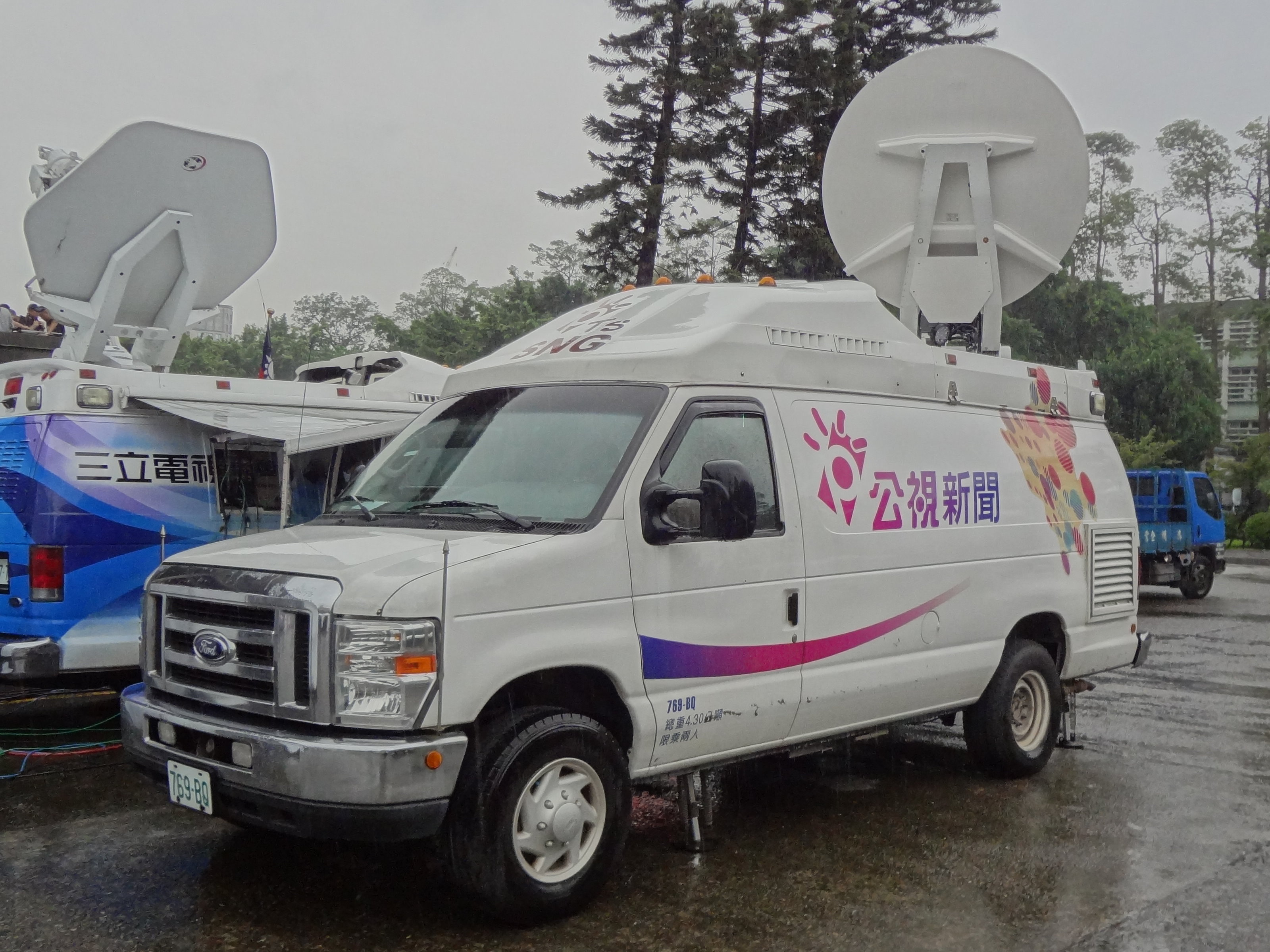 2016年（中華民國105年）第51屆金鐘獎電視金鐘獎星光大道，公視新聞SNG車769-BQ。